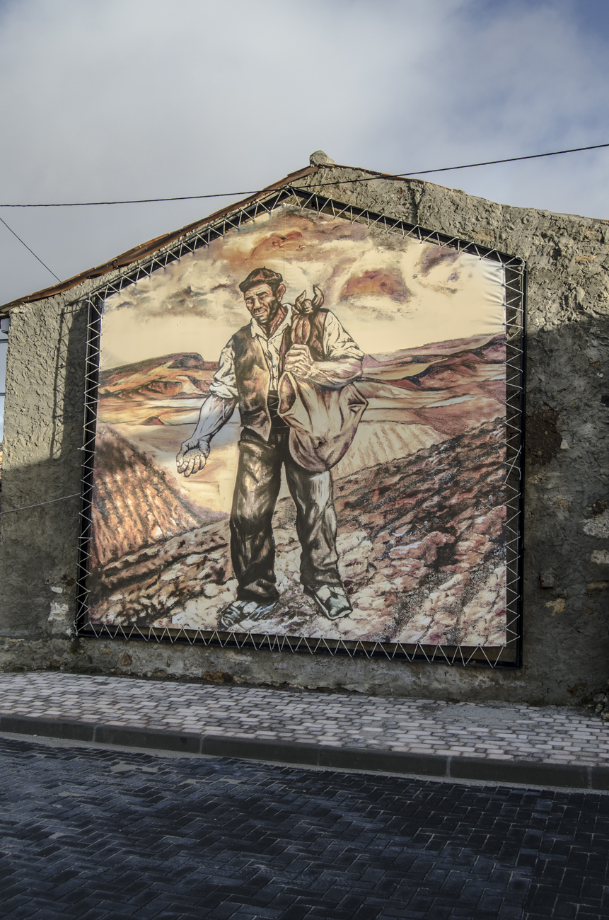 Llanillo. Valle de Valdelucio. España. Mural homenaje al campesino.